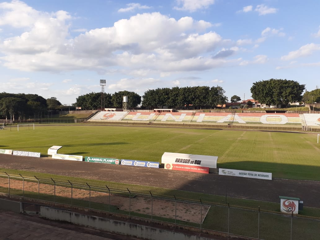 Foto do Estádio Hermínio Ometto, em 2020